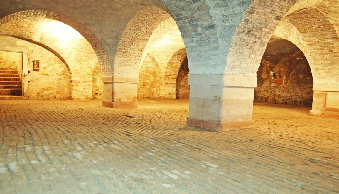 A billegpusztai Balogh-Esterházy kastély pincéje